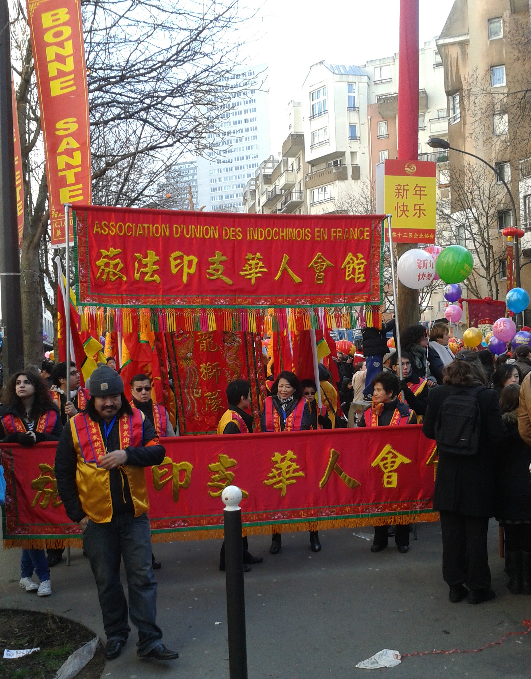 Défilé du nouvel an chinois à Paris